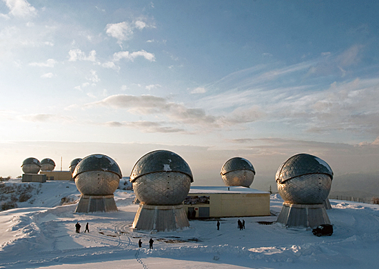 Оптико-электронный комплекс контроля космического пространства ОЭК «Окно» (г. Нурек, Республика Таджикистан)